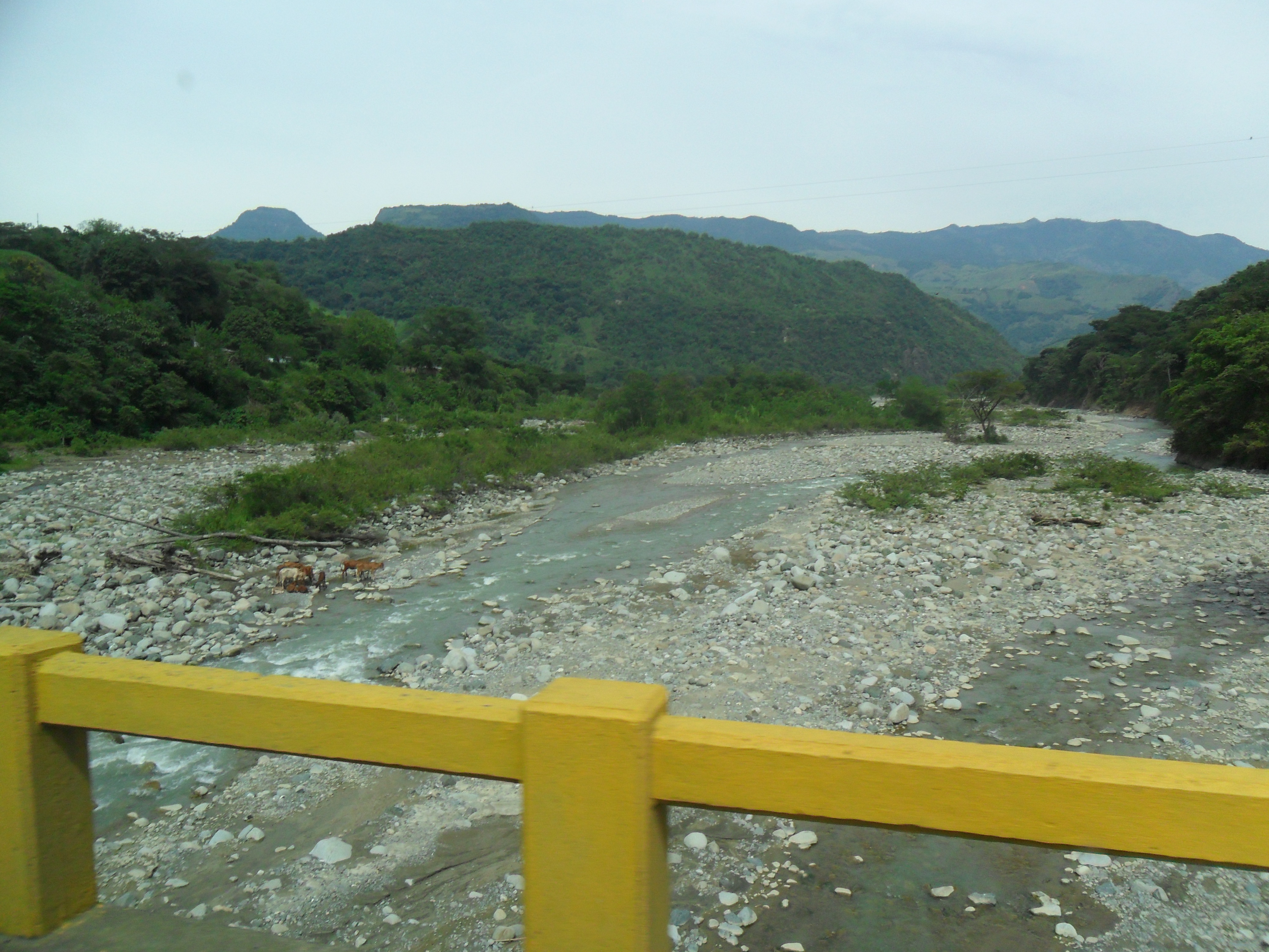 Vista de la Quebrada Sinifaná, vista desde el puente que la cruza en la vía Medellín-Bolombolo.